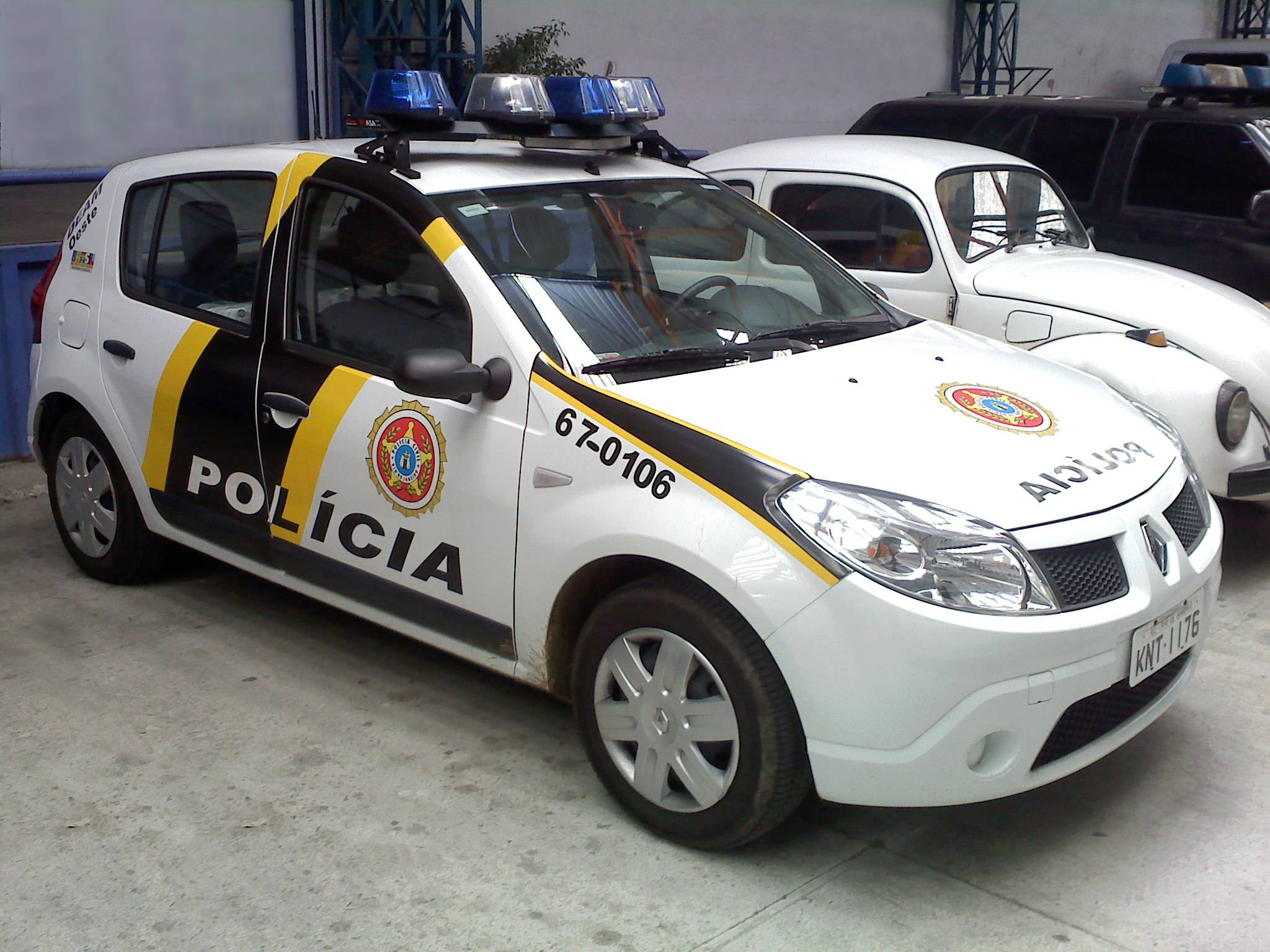 Viatura da Polícia Civil do Estado do Rio de Janeiro da frota de 2009 - fotografado no interior da Academia de Polícia